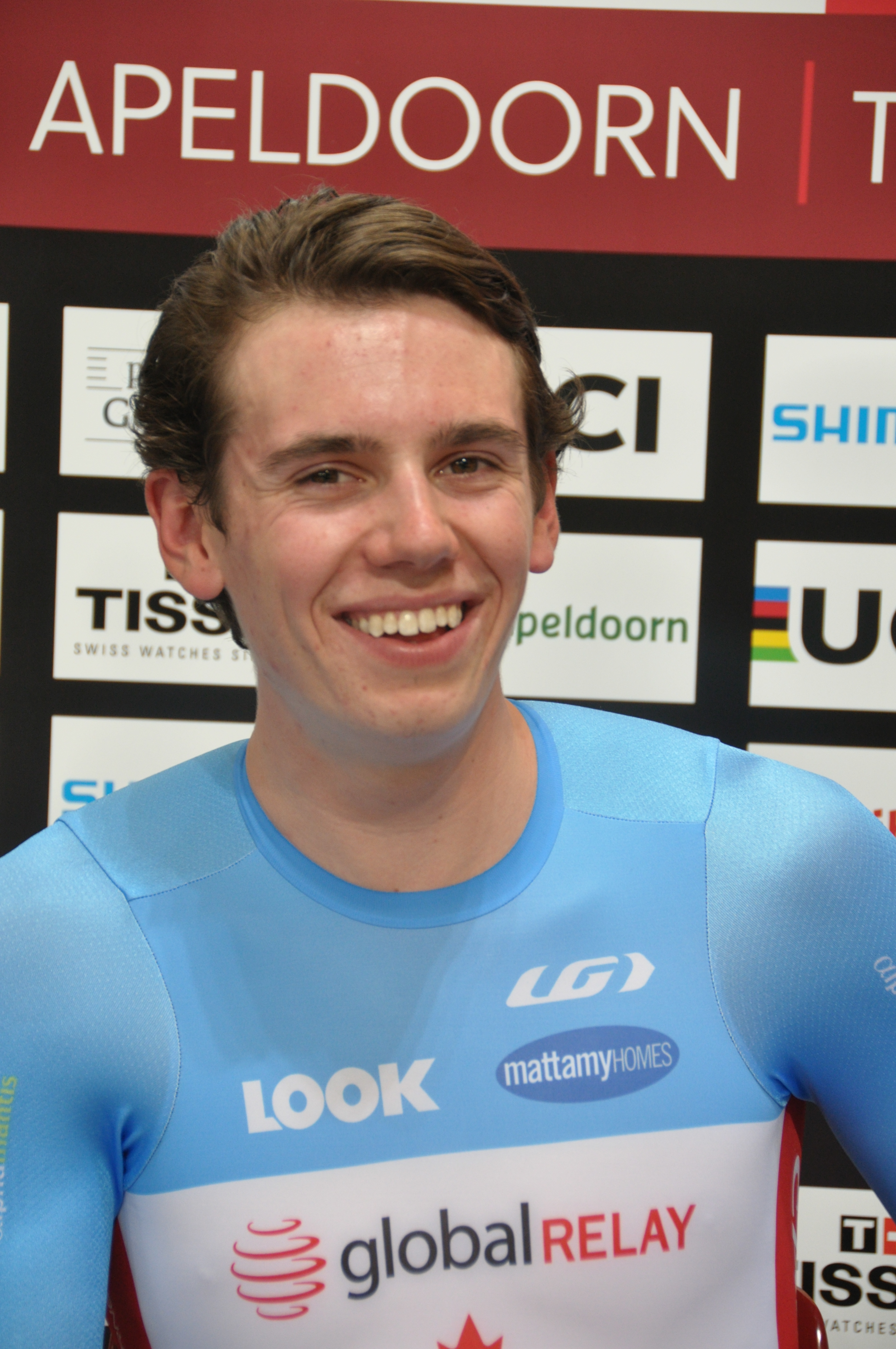 Jay Lamoureux, kanadischer Radsportler